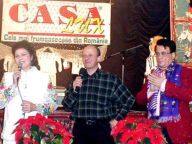 Irina Loghin, Ion Dolanescu si Mihai Malaimare